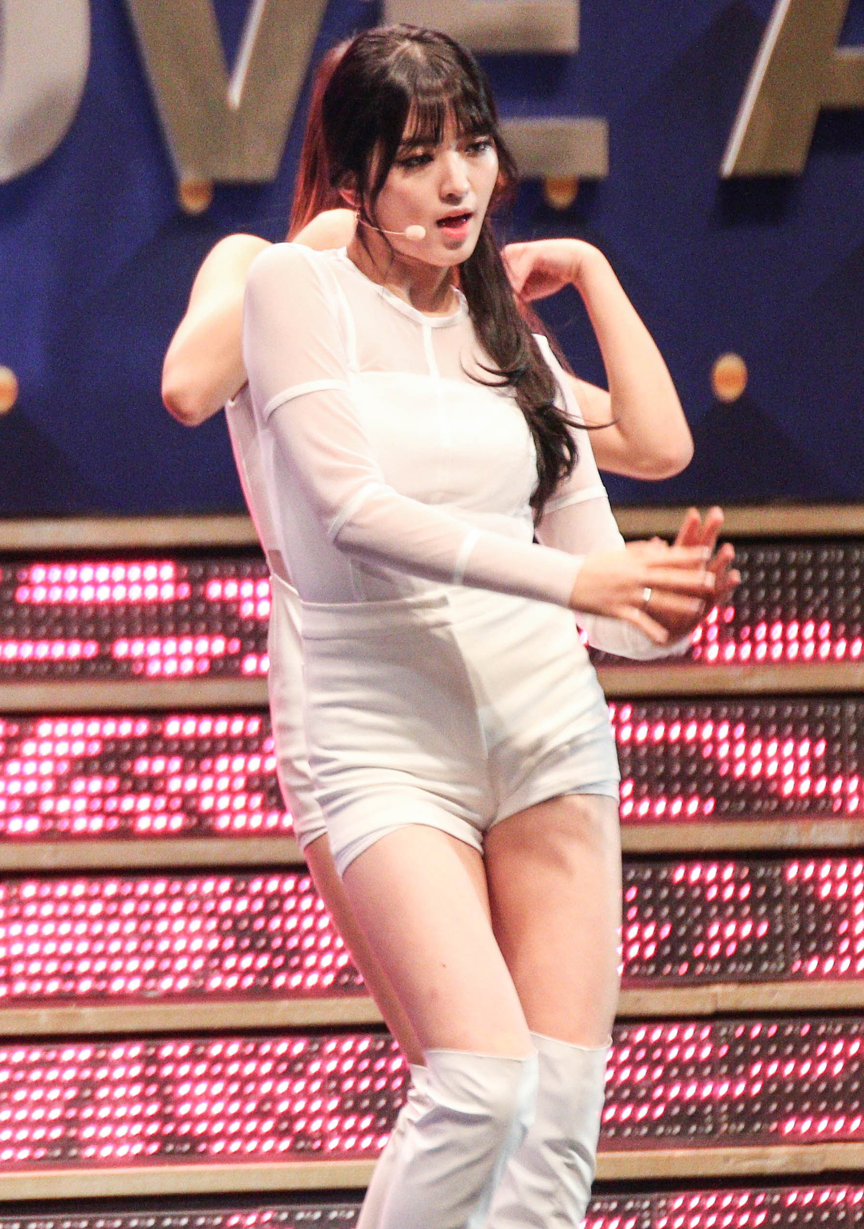 141209 AOA 골든글러브 시상식 축하공연 (+설현 시상 포함)